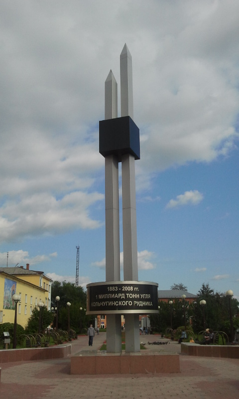 Памятник, посвящённый добыче 1 миллиарда тон угля на Кольчугинском руднике близ г. Ленинска-Кузнецкого с 1883 по 2008 годы.